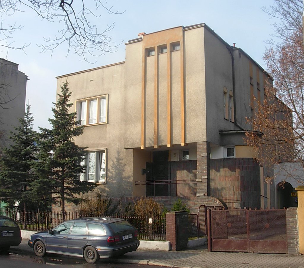 Willa Aleja Ossolińskich 5 w Bydgoszczy (1935, arch. Jan Kossowski